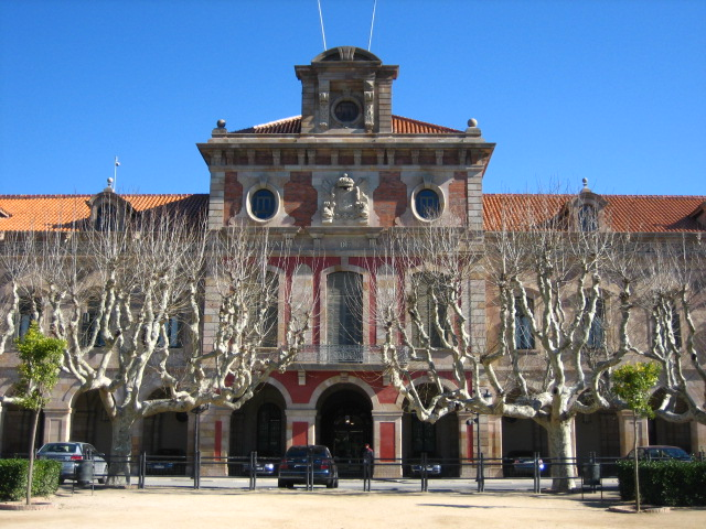 Vista exterior del parlament de Catalunya